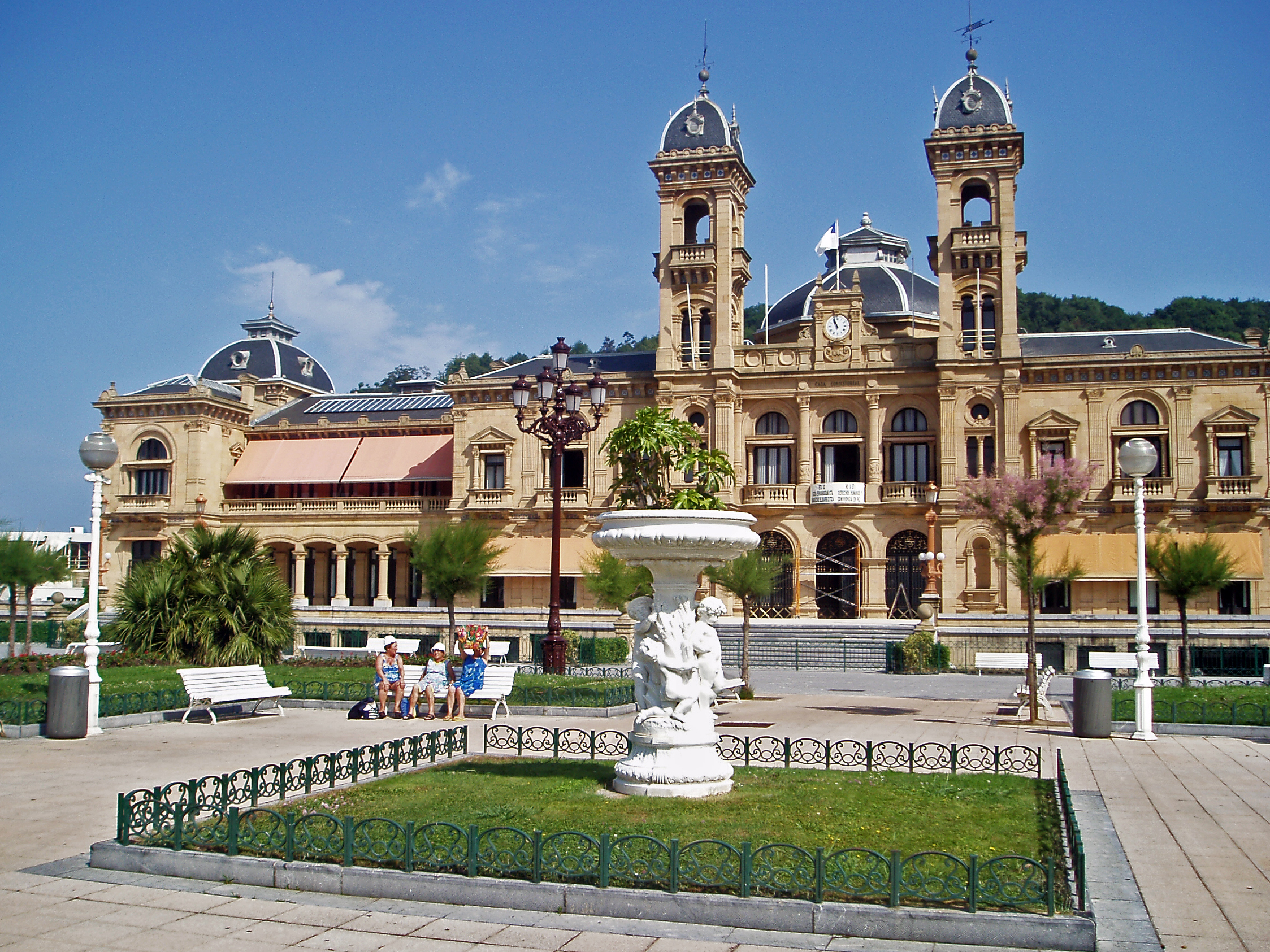 "Vista del Ayuntamiento de San Sebastian (Guipúzcoa)."